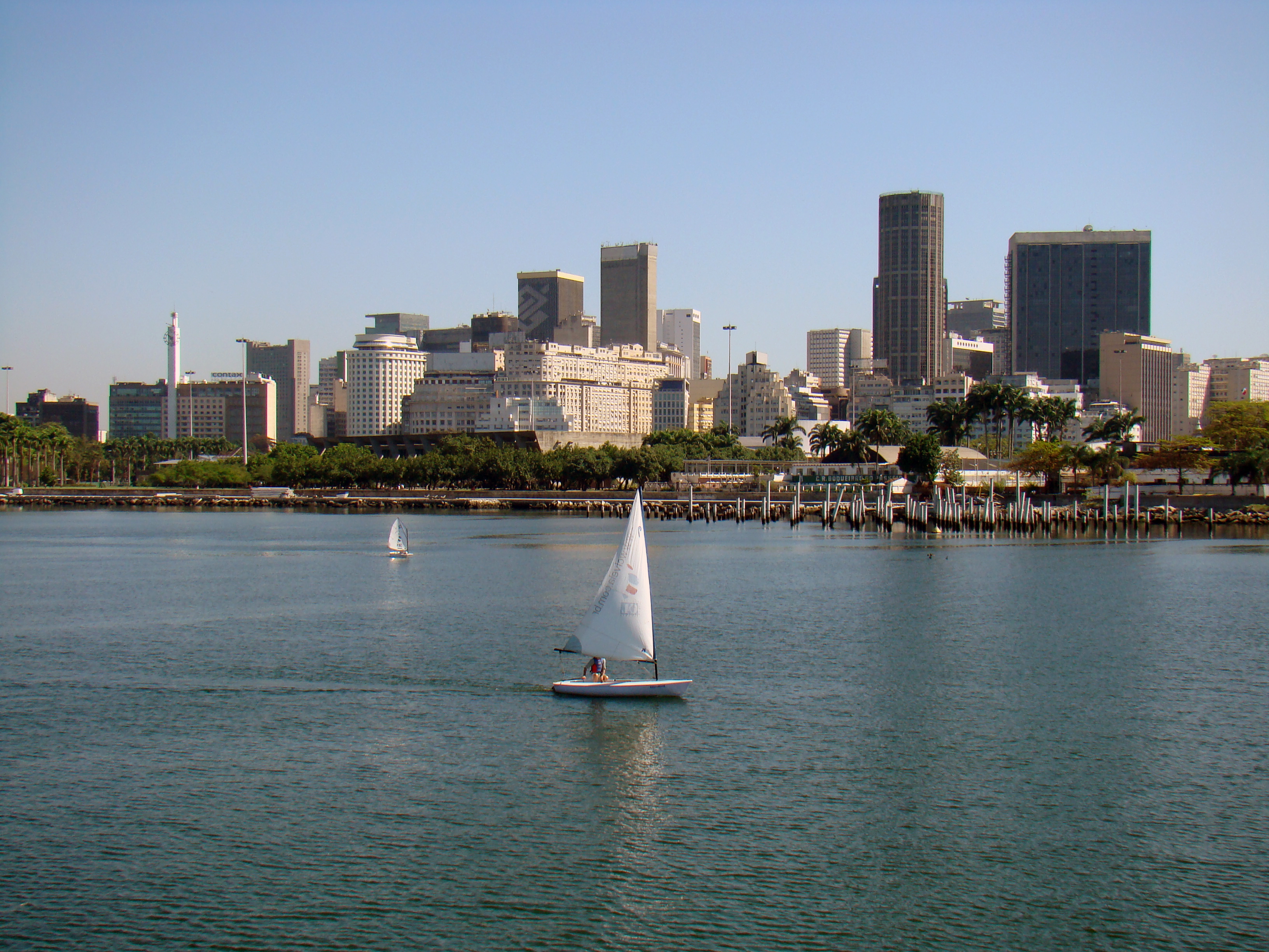 Marina da Glória